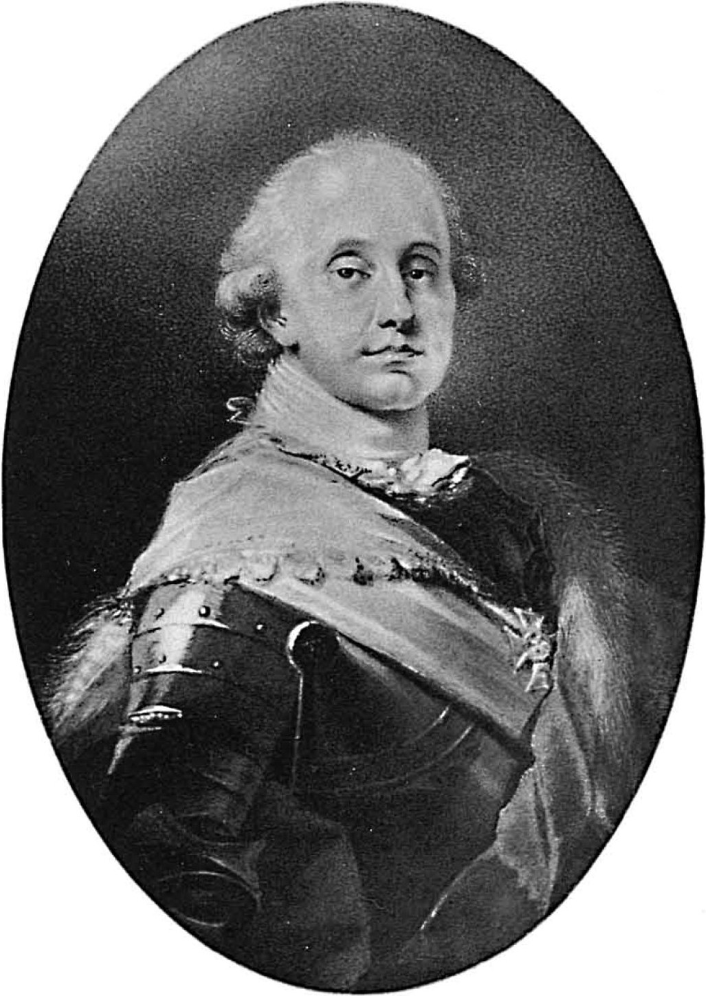 Karl Heinrich Nikolaus Otto, Prinz von Nassau-Siegen